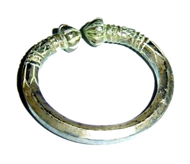 Een Keltische torque uit massief zilver. Eigen foto Ben Pirard